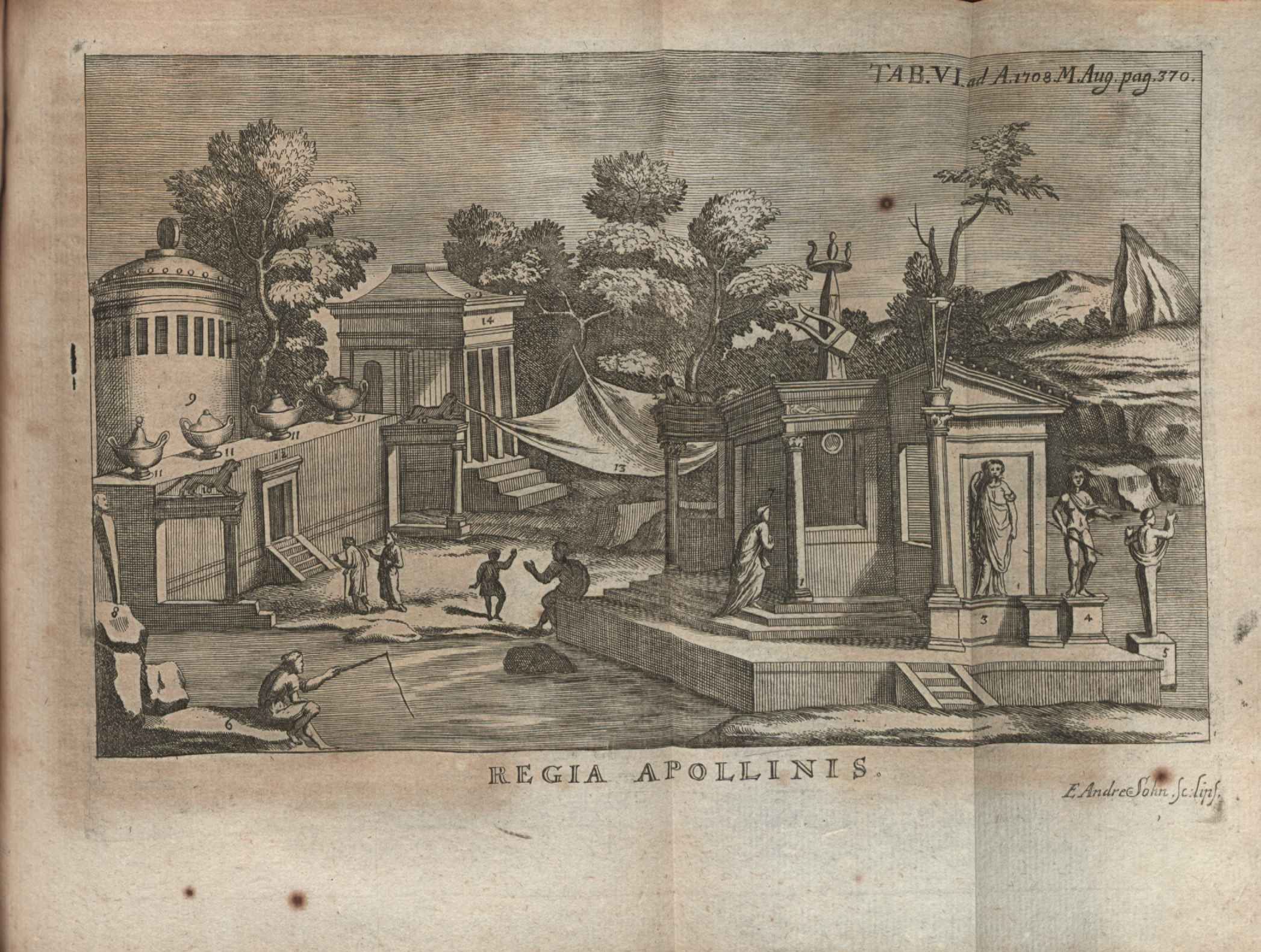 Illustration